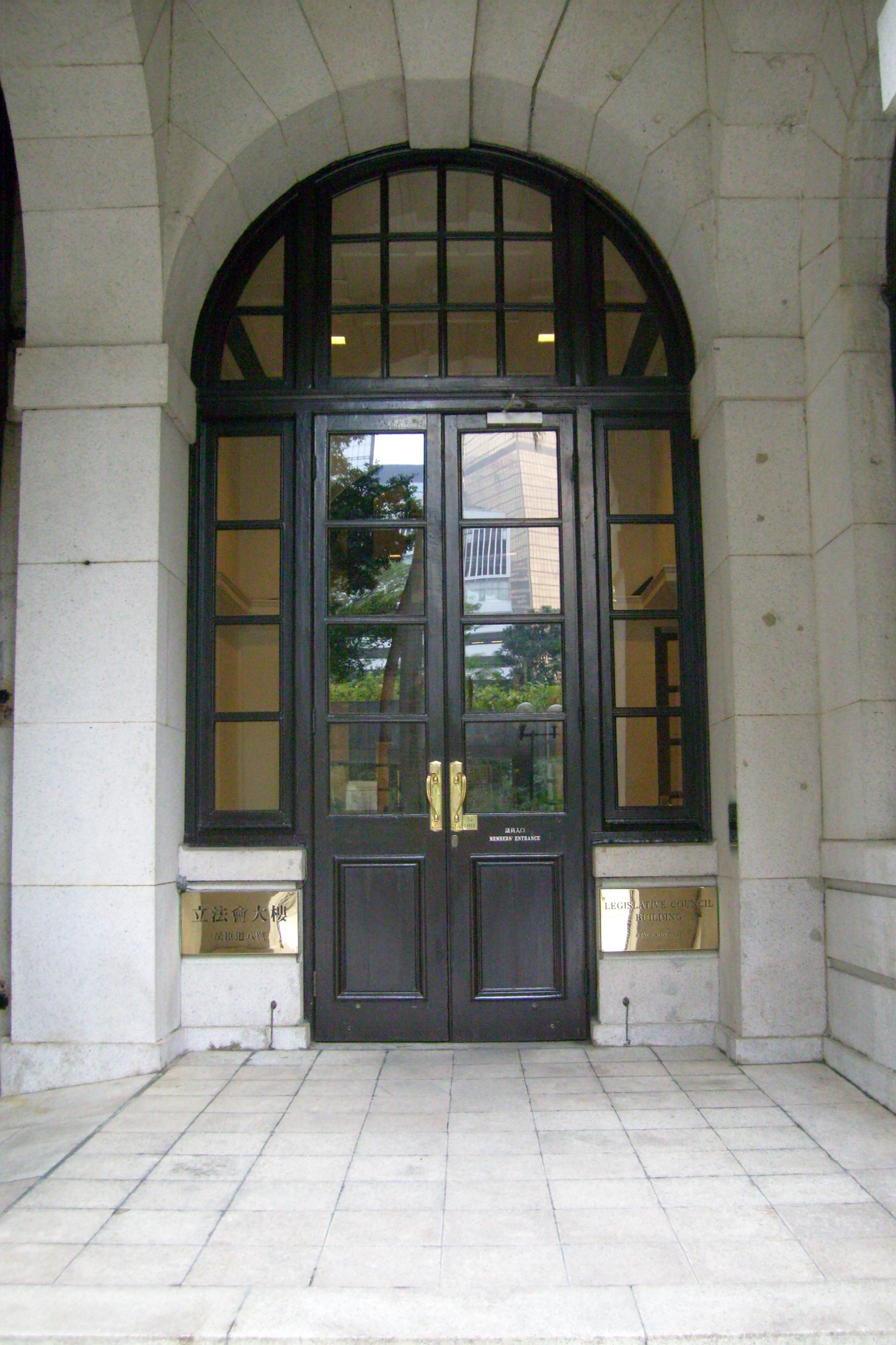 香港立法會大樓議員入口